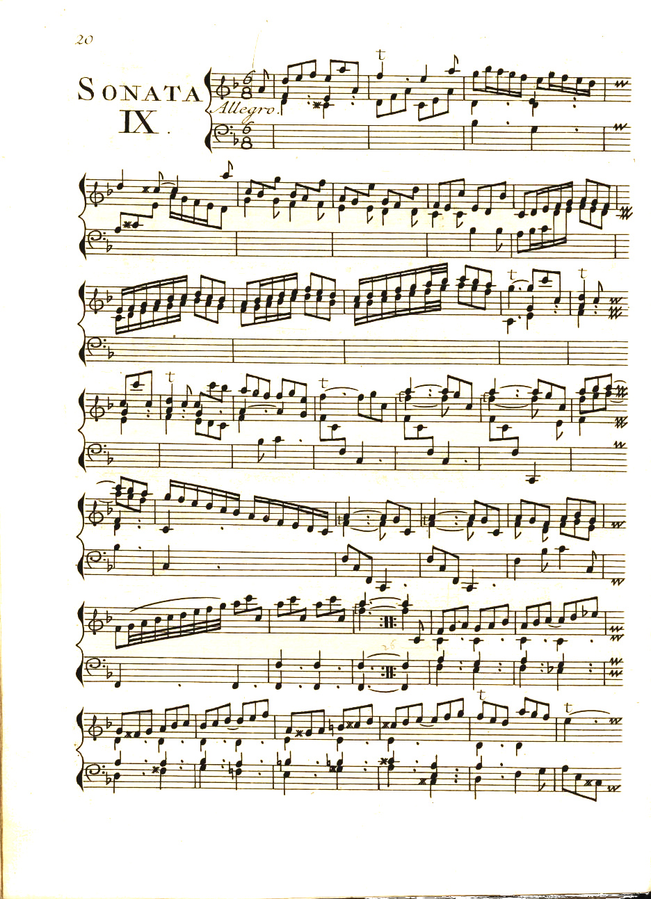 La sonate K. 9, dans une édition des Essercizi per gravicembalo, publiés à Amsterdam en 1742.